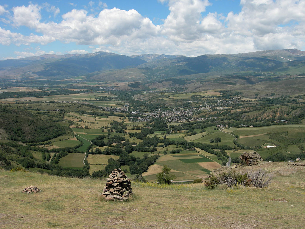 Paisatge de Llívia (Cerdanya, Catalunya, Països Catalans)